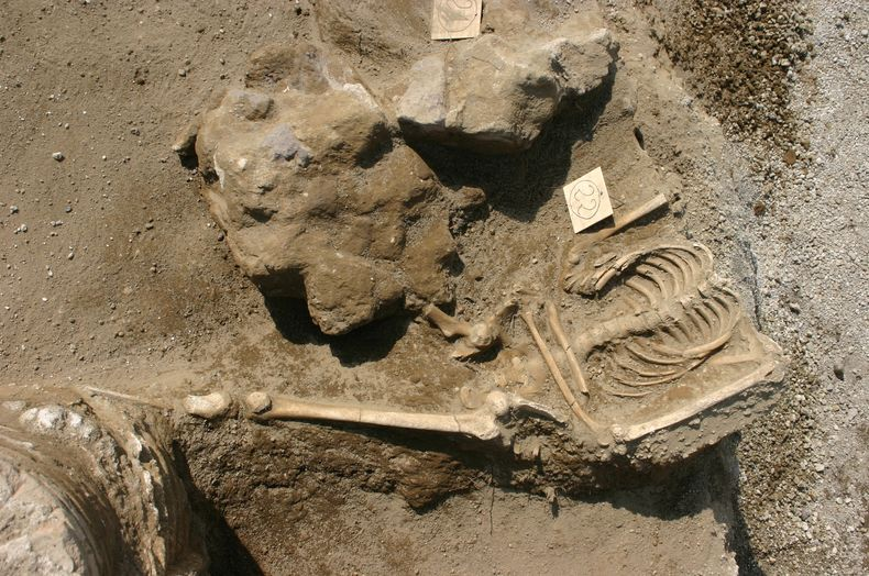 Il primo scheletro trovato a Stabia